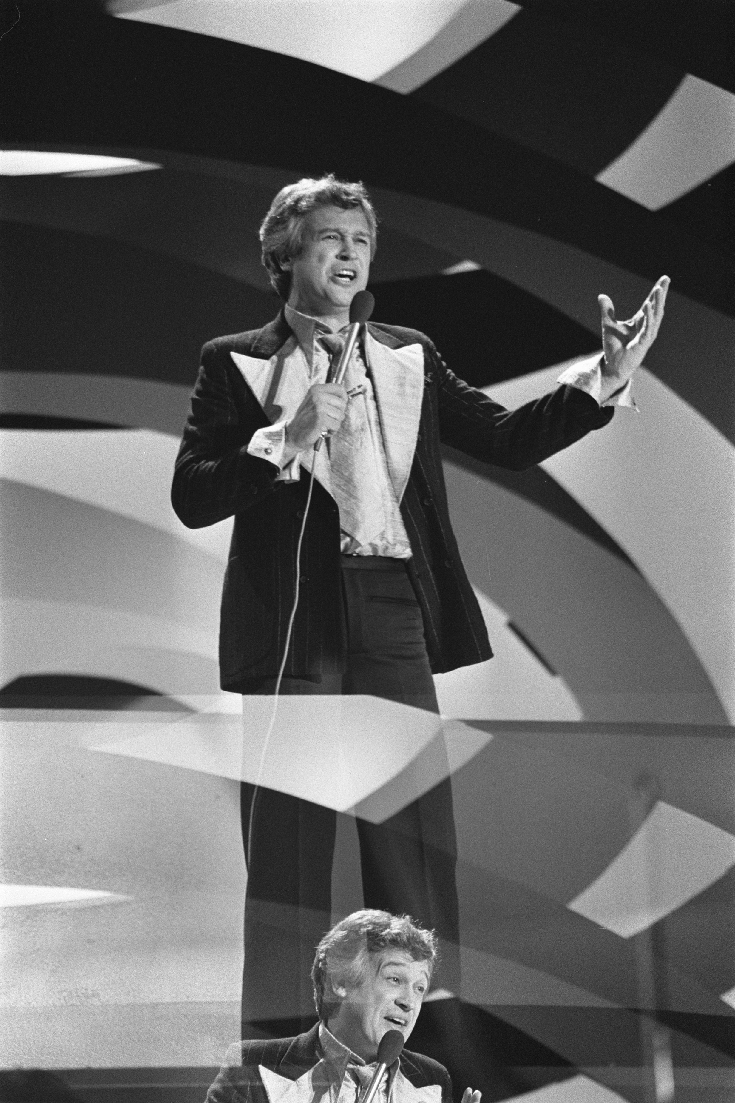 Collectie / Archief : Fotocollectie Anefo Reportage / Serie : [ onbekend ] Beschrijving : Songfestival; Dick Rienstra Datum : 2 februari 1977 Trefwoorden : Songfestivals Fotograaf : Suyk, Koen / Anefo Auteursrechthebbende : Nationaal Archief Materiaalsoort : Negatief (zwart/wit) Nummer archiefinventaris : bekijk toegang 2.24.01.05 Bestanddeelnummer : 929-0092 Reacties Geplaatst door Maaike op 10 april 2012 - 13:01. Nationaal Songfestival deelnemer met liedje 'Jouw lach'.